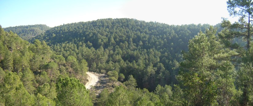 La Carena de la Baga de Vall-llosera (Monistrol de Calders, Moianès)